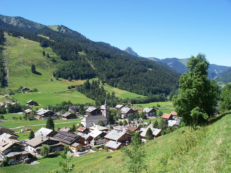 La Chapelle d'Abondance, dans la vallée d'Abondance